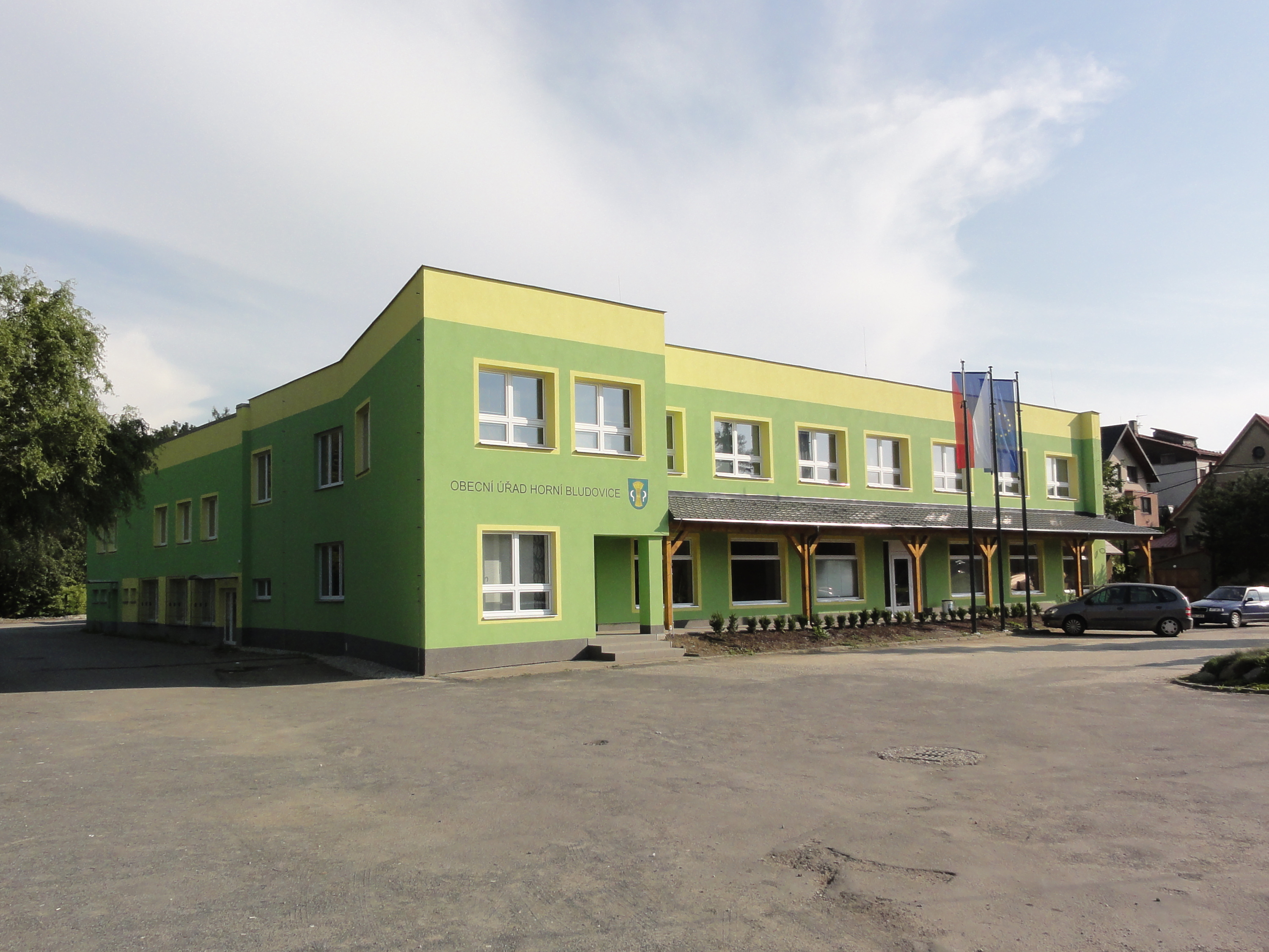 Urząd gminy w Błędowicach Górnych